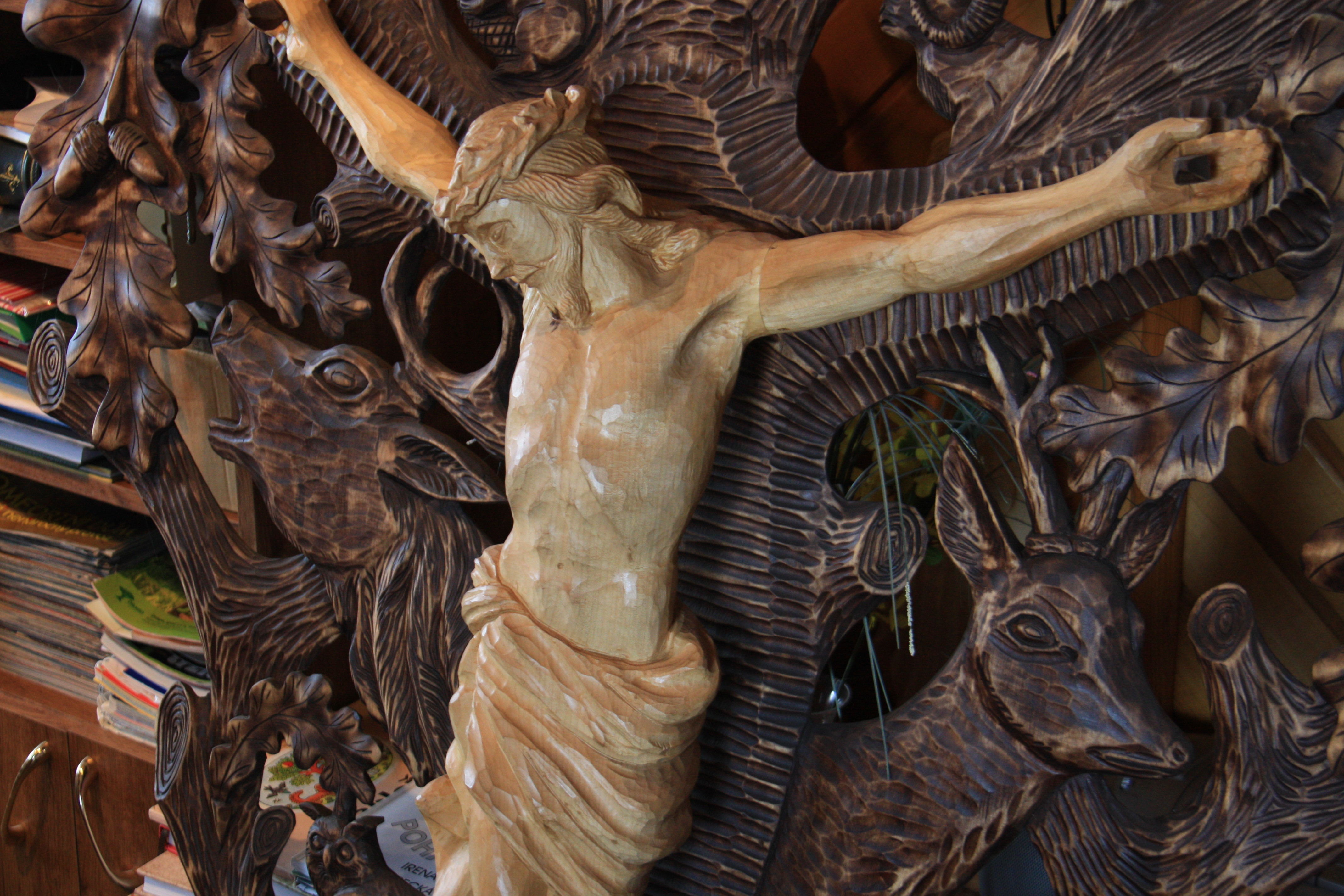 Rzeźba myśliwego Jana Brlicy starszego